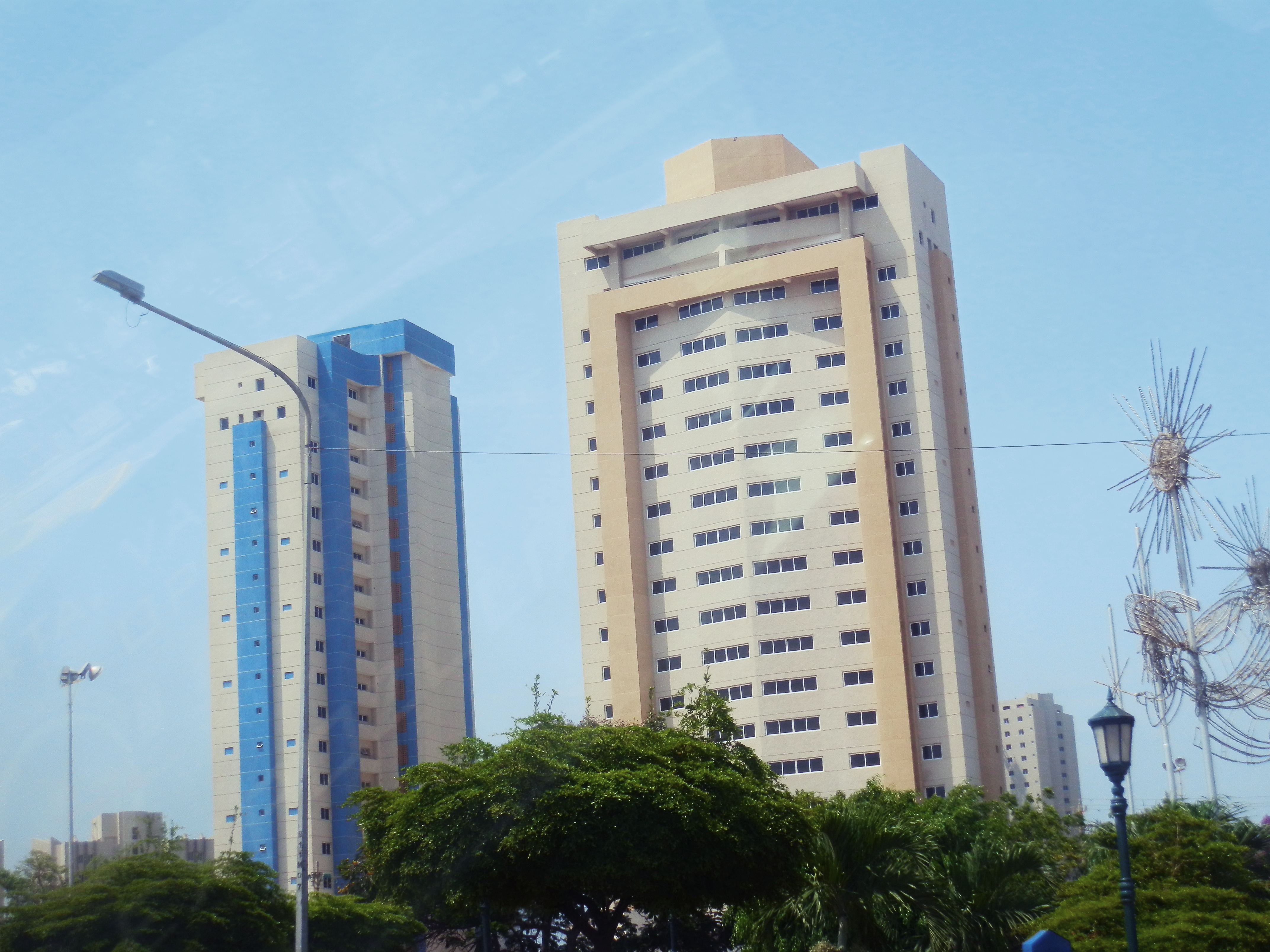 Edificios en la Avenida El Milagro, Maracaibo, Venezuela